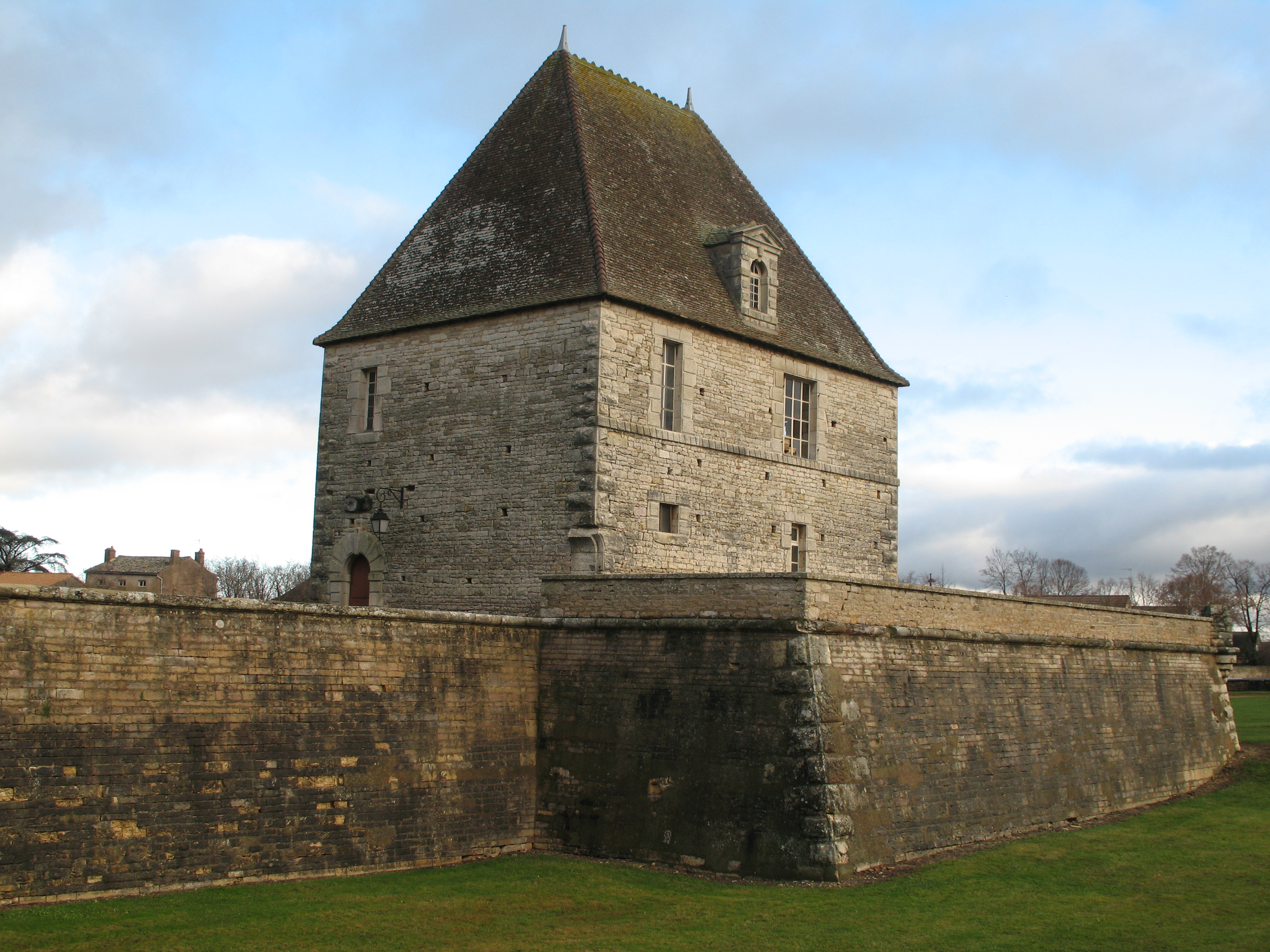 château de Sennecey-le-Grand (Saône-et-Loire)